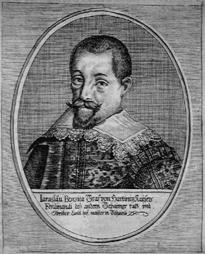 Portrét Jaroslava Bořity z Martinic